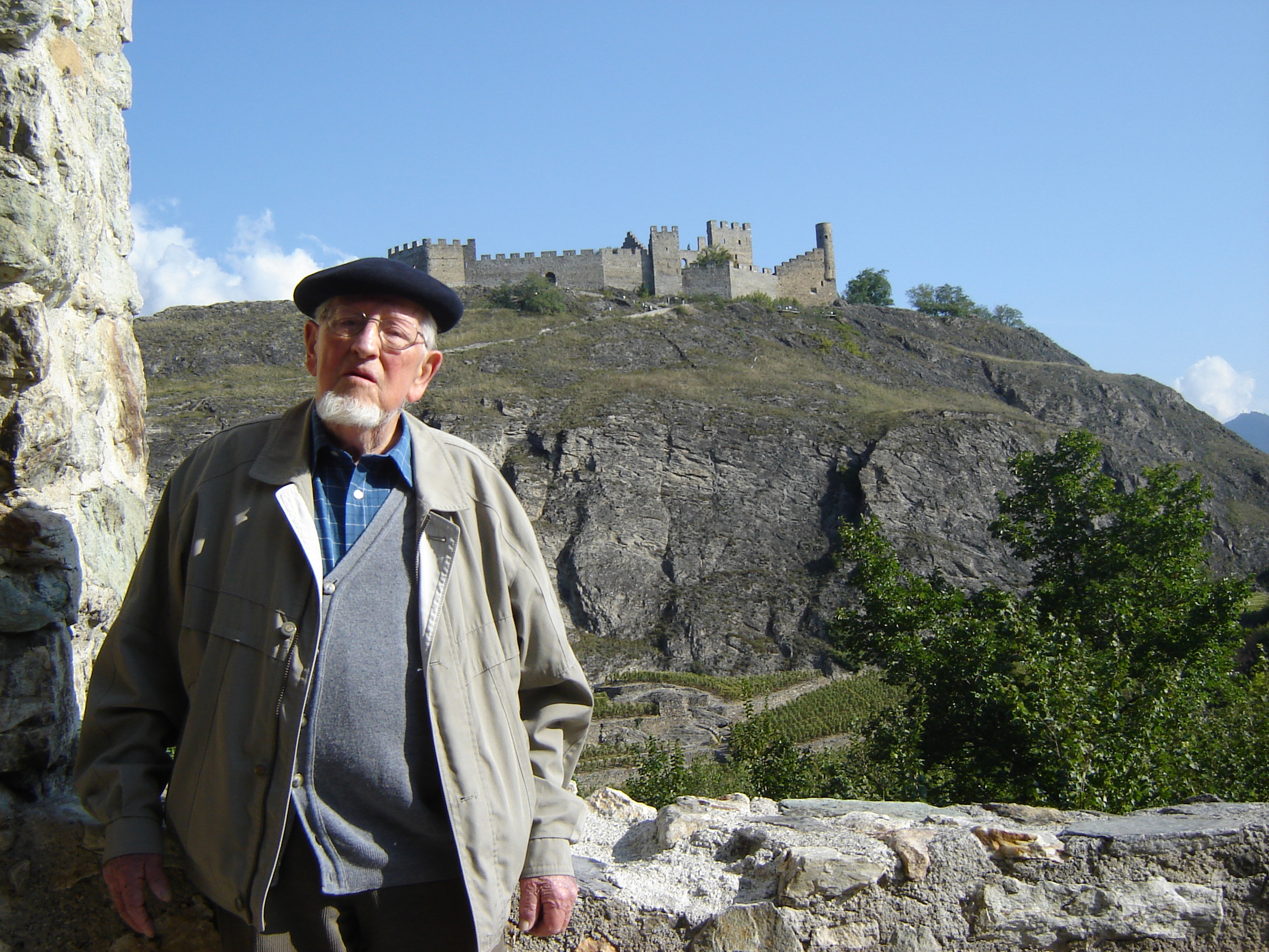 Charles Menge in front of the Tourbillon Castle